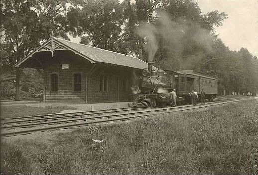 Bahnhof der South Manchester Railroad an der Ecke von Hartford Road und Elm Street bei der Cheney Hall.